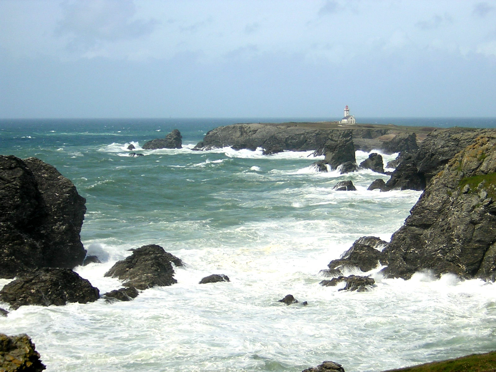 Belle-ile, Les Poulains, un jour de tempête